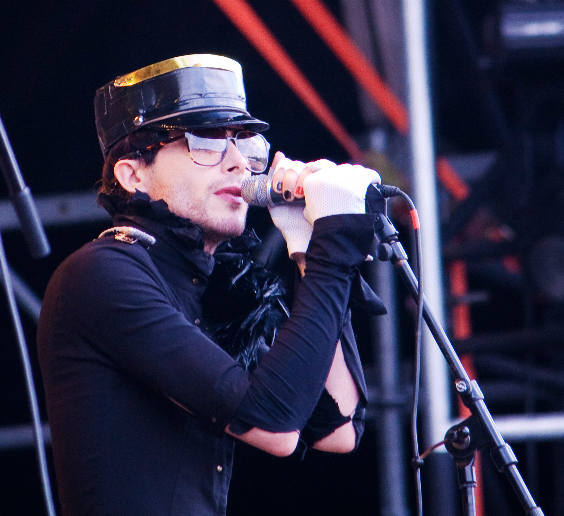 2009-08-12 - Budapest